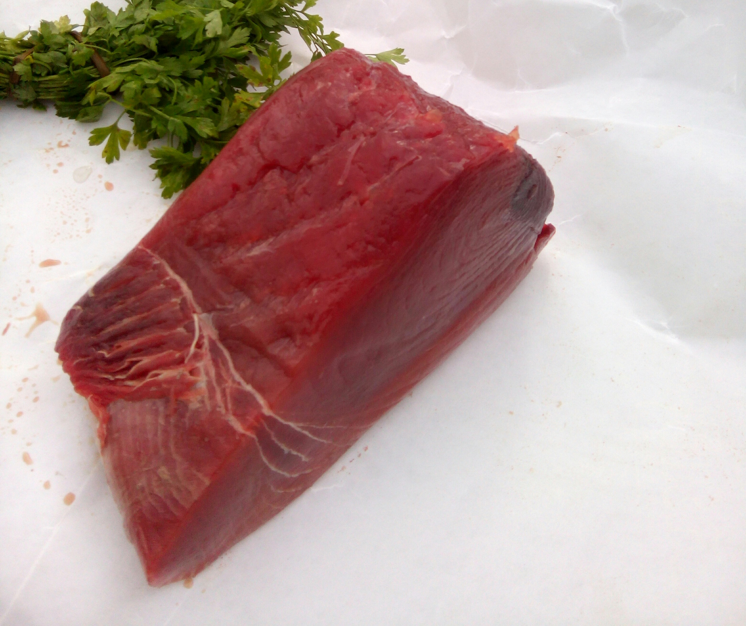 Trancio di tonno rosso di Favignana